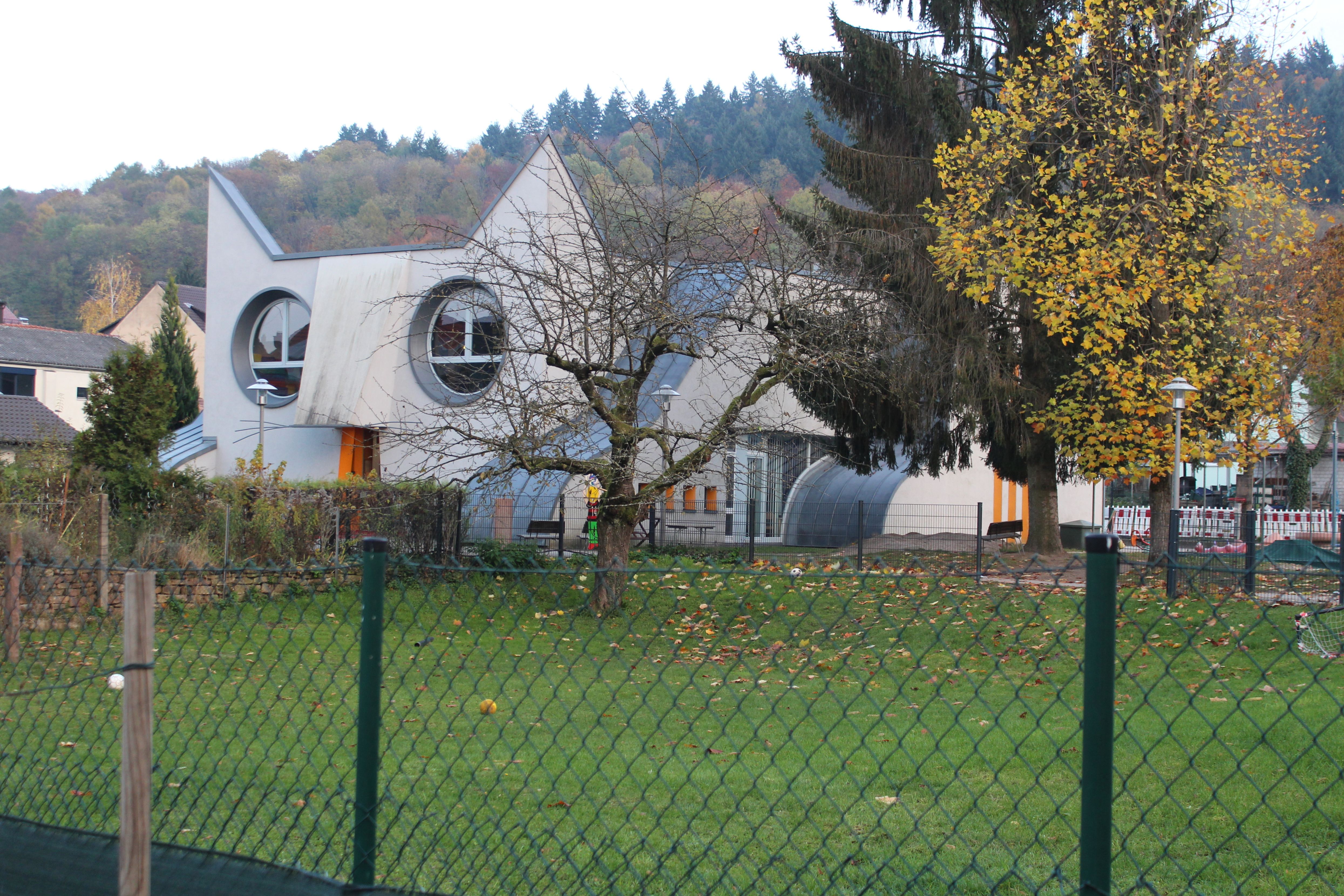 Kindergarten "Die Katze" in Karlsruhe-Wolfartsweier